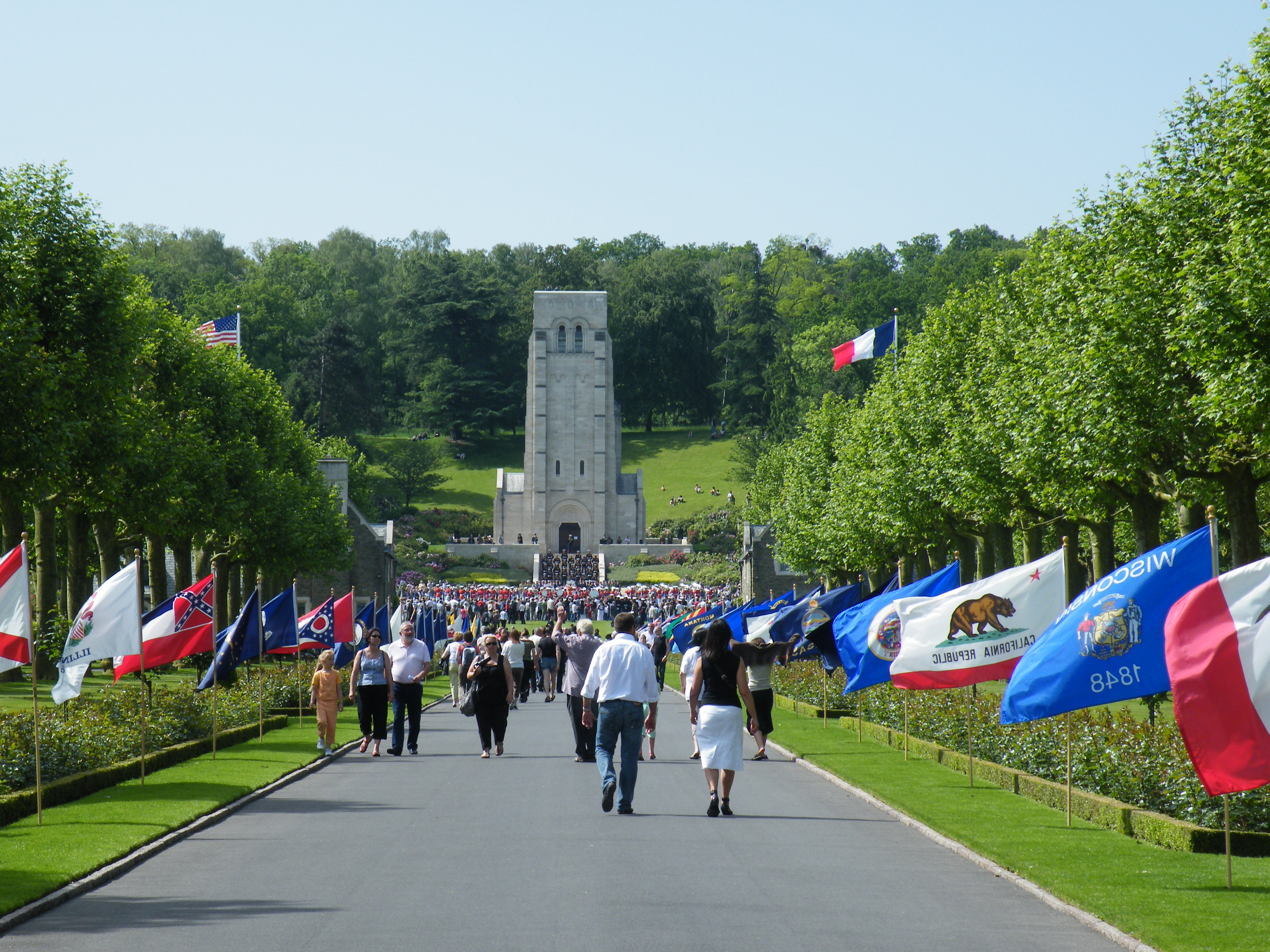 Bois de Belleau Commémoration du 24 Mai 2009